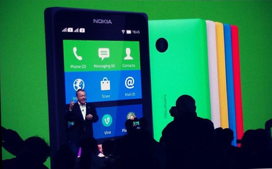 NOKIA X и Х+ таки на андроиде. С возможностью быстро переделать под них существующие андроид-придожения.